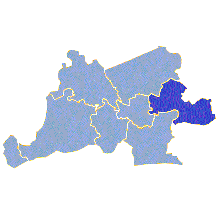 Powiat gorzowski - Gmina Santok